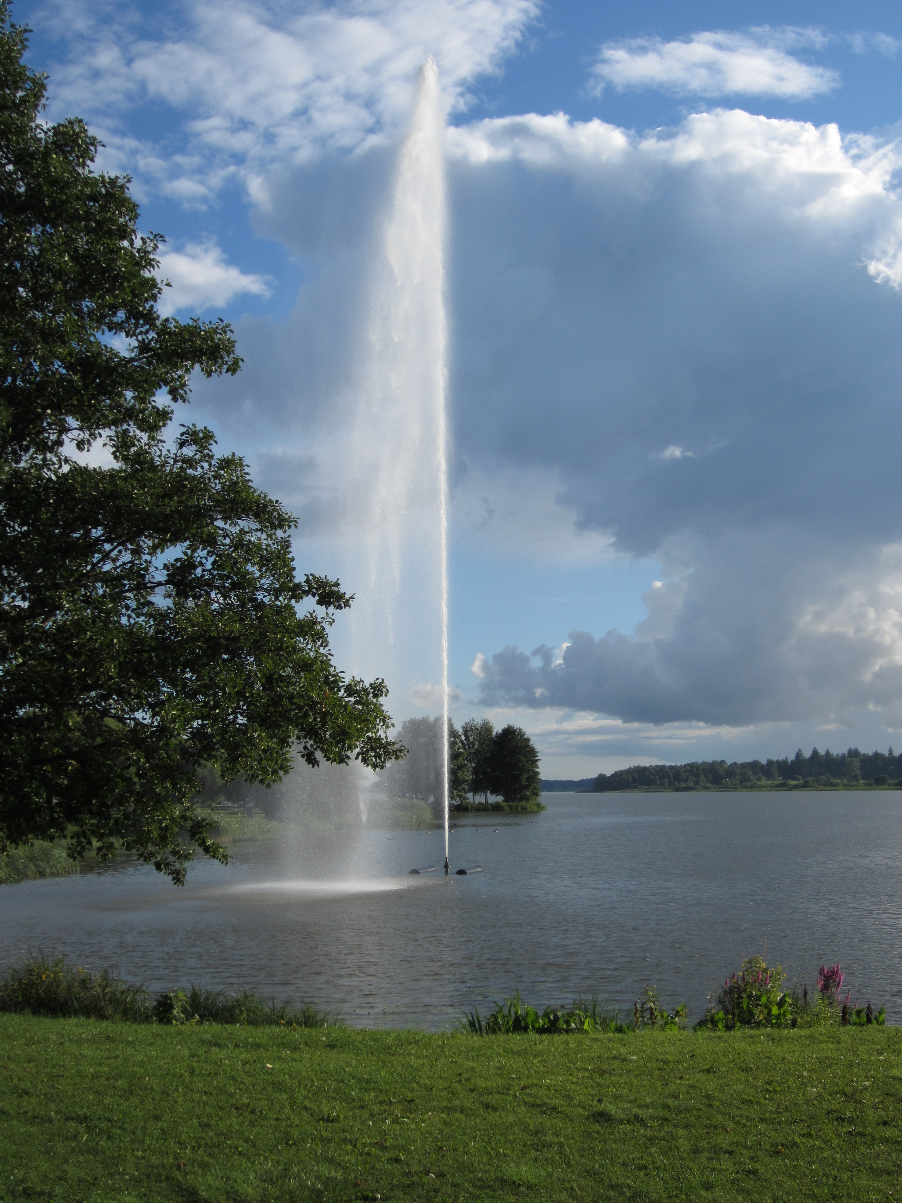 Suihkulähde Järvenpään rantapuistossa